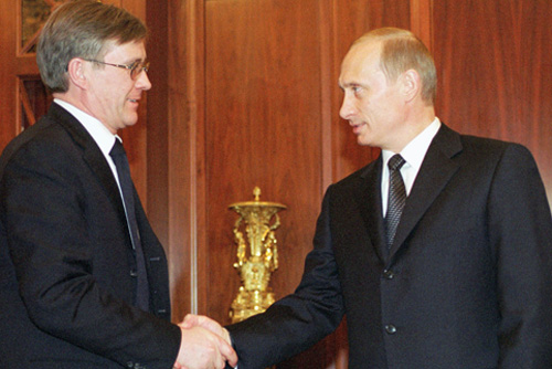 МОСКВА, КРЕМЛЬ. С генеральным директором «Сургутнефтегаза» Владимиром Богдановым.